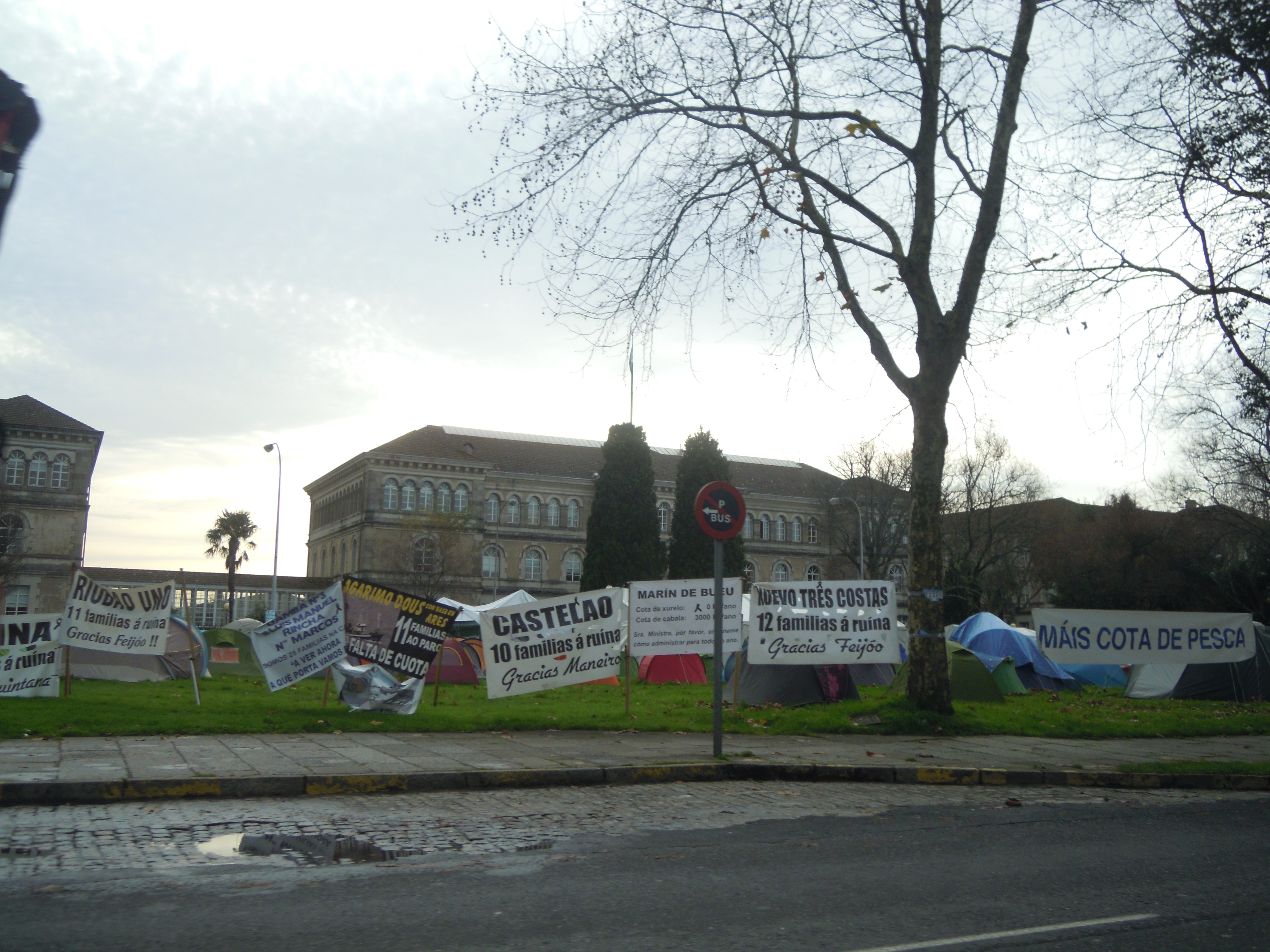 Afectados pola redución de cota para a pesca de cerco acampados en San Caetano (Santiago de Compostela) diante dos edificios administrativos da Xunta de Galicia